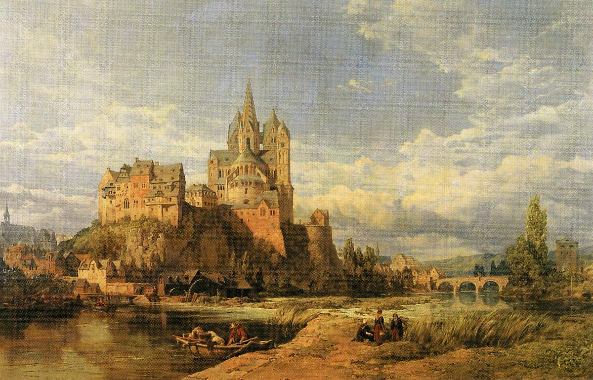 Gemälde von George Clarkson Stanfield (1828-1878) von 1862. Ansicht des Limburger Domes von Osten aus gesehen. Zu sehen sind auch die Alte Lahnbrücke sowie das Schloss. This is a picture of the hessian Kulturdenkmal (cultural monument) with the ID 53207 This is a picture of the hessian Kulturdenkmal (cultural monument) with the ID 53076